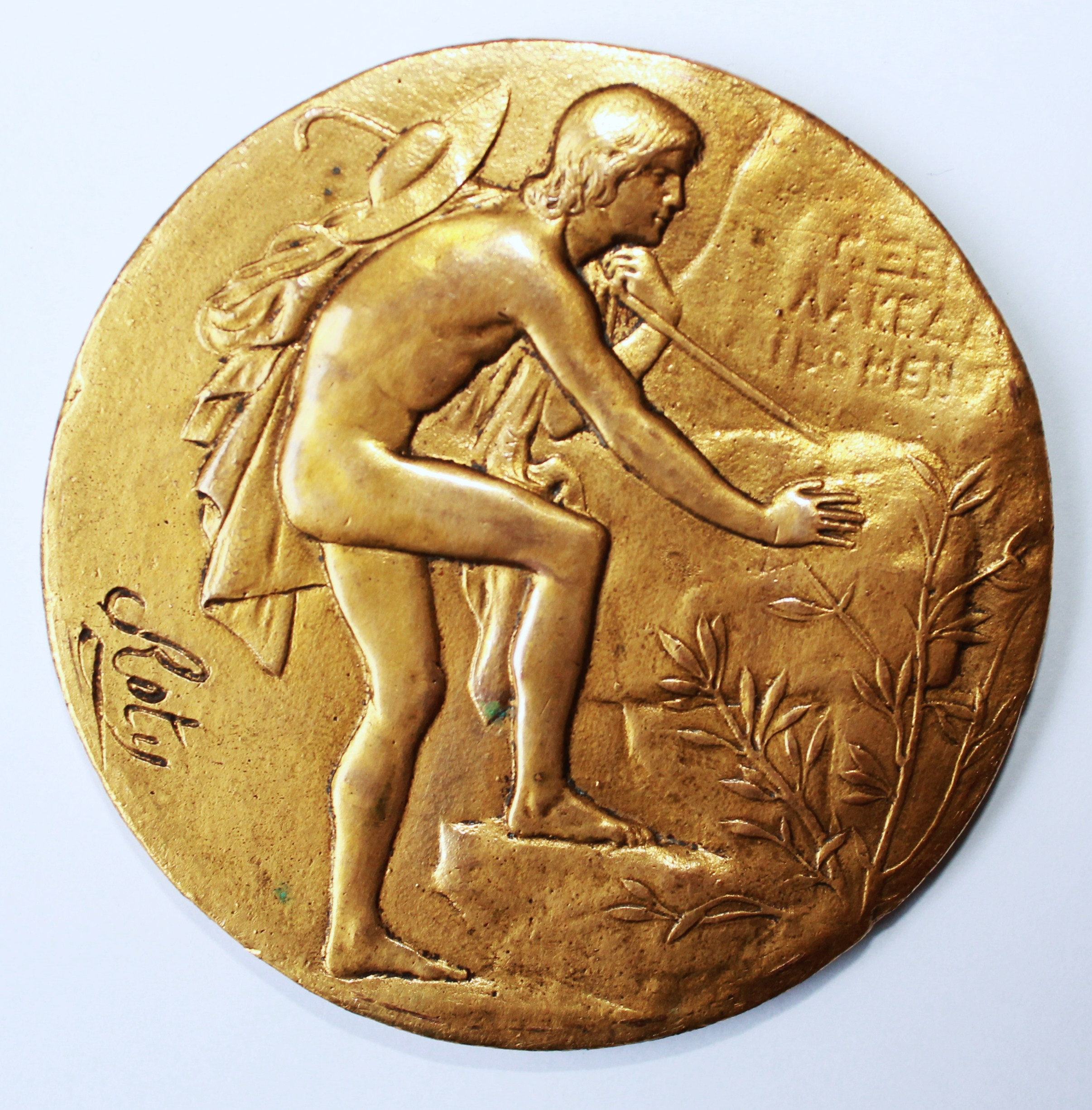 Médaille (70mm) du premier grand Prix de Rome en 1875 par le graveur Oscar Roty. Un berger cherchant à lire une inscription sur un rocher du passage des Thermopyles.